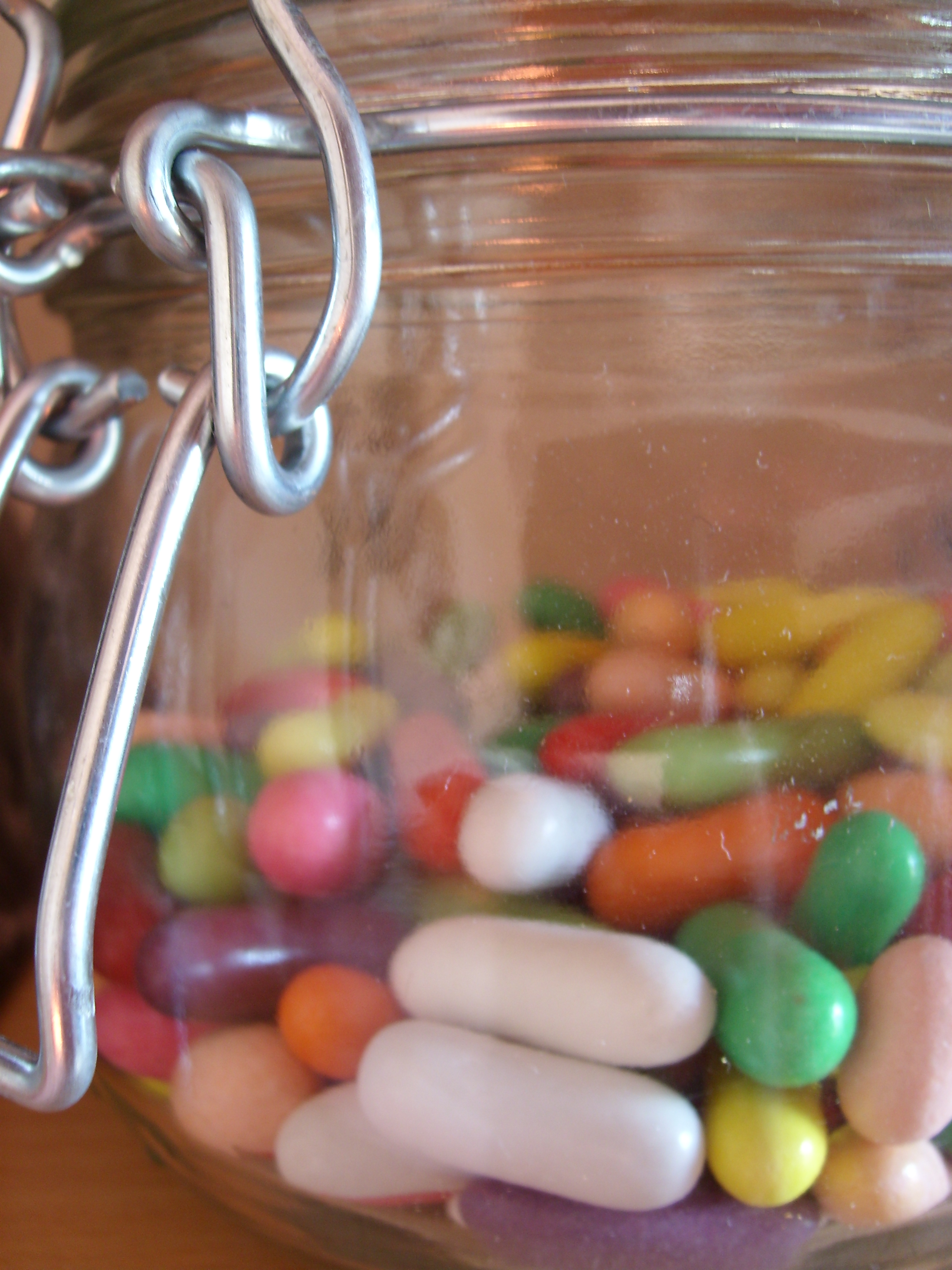 Licorice comfits